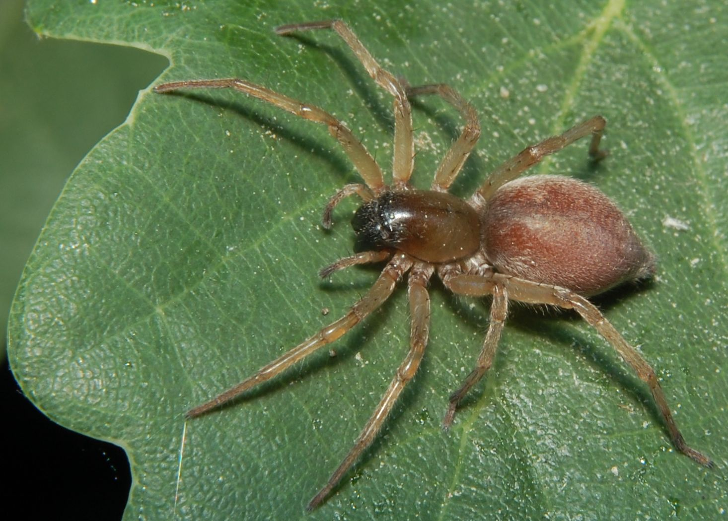 Clubiona pallidula, Weibchen; det. K.-H. Kielhorn, Berlin. Forst Jungfernheide, Berlin, Deutschland